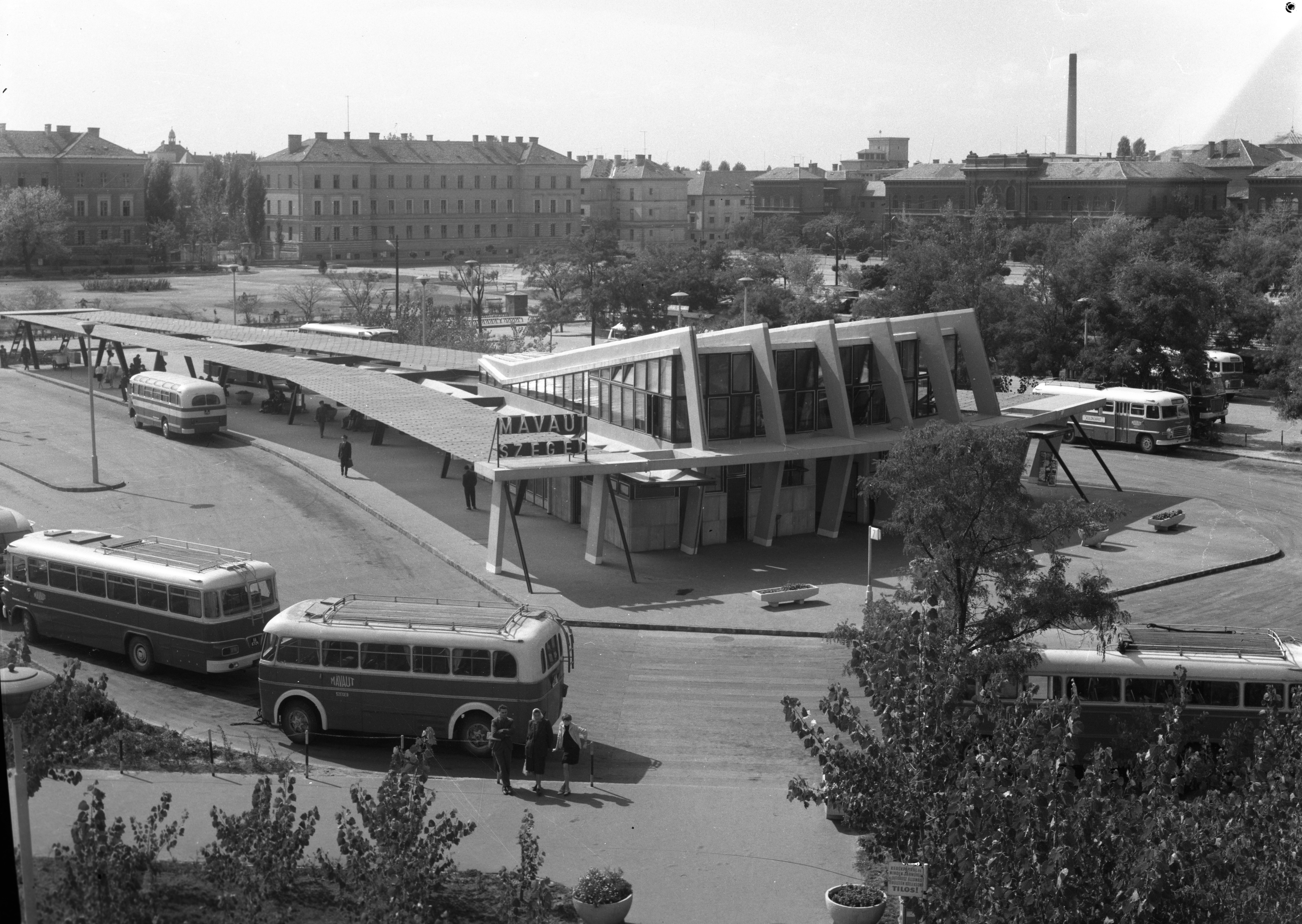 Mars (Marx) tér, autóbusz-állomás. Location: Hungary, Szeged Tags: picture, bus, Hungarian brand, Ikarus-brand, MÁVAUT-organisation, bus terminal, trailer, bus stop Title: Mars (Marx) tér, autóbusz-állomás.